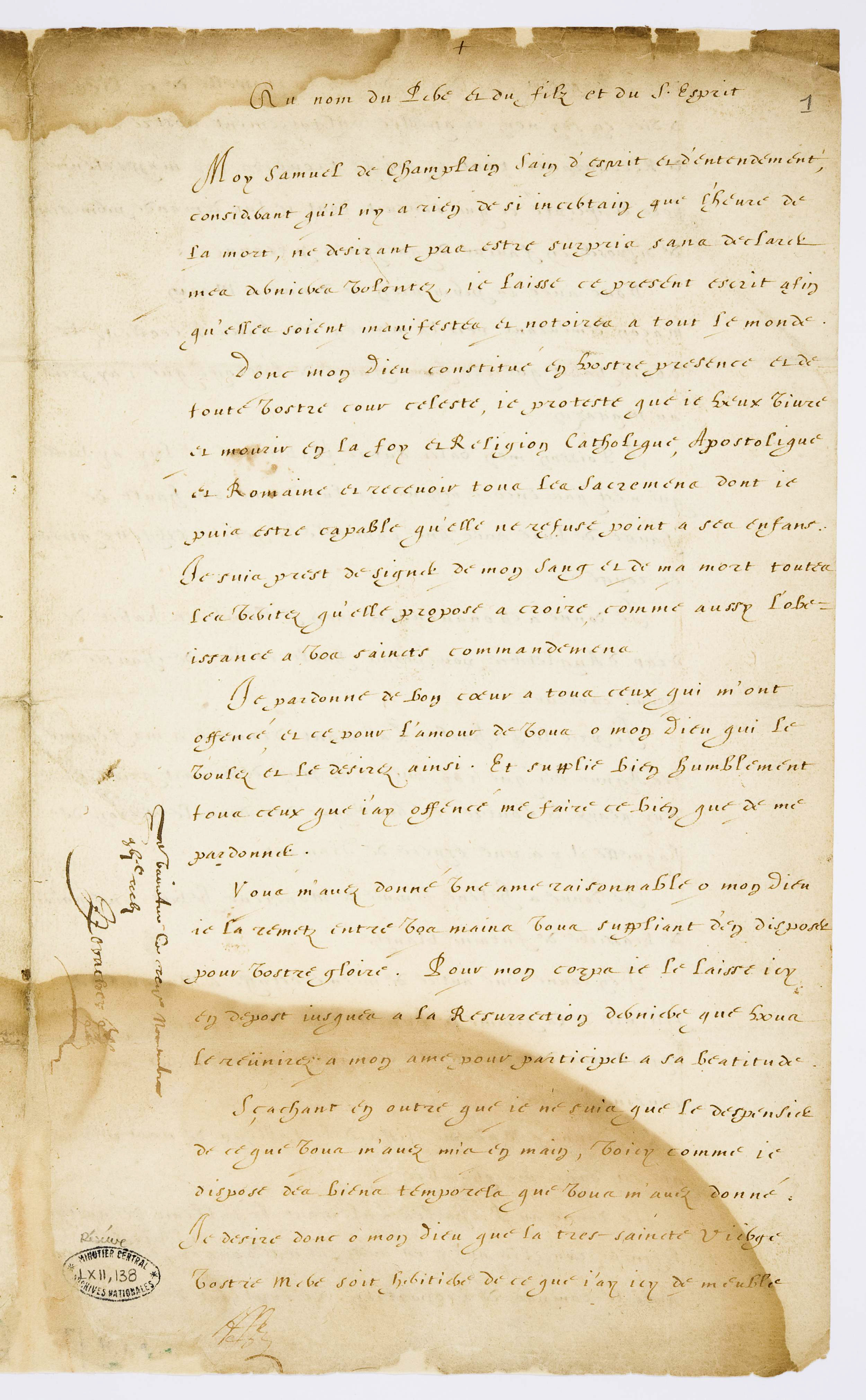 Dépôt du testament de Samuel Champlain fait à Québec le 17 novembre 1635, première page